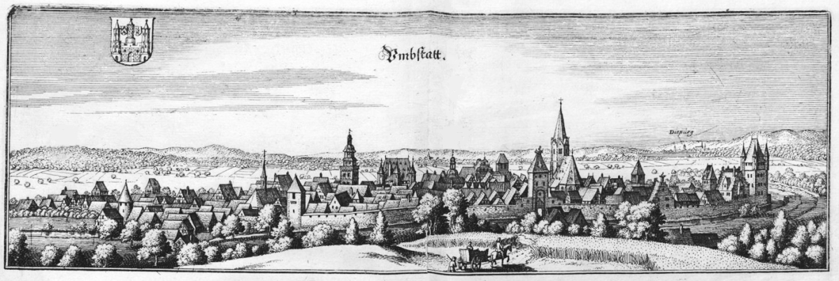 Topographia Palatinatus Rheni et Vicinarum Regionum Das ist, Beschreibung vnd Eigentliche Abbildung der Vornemsten Statte, Plätz der Vntern Pfaltz am Rhein Vnd Benachbarten Landschafften, als der Bistümer Wormbs Vnd SpeÈyer, der Bergstraß, des Wessterreichs, Hundsrücks, ZweÈybrüggen, etc